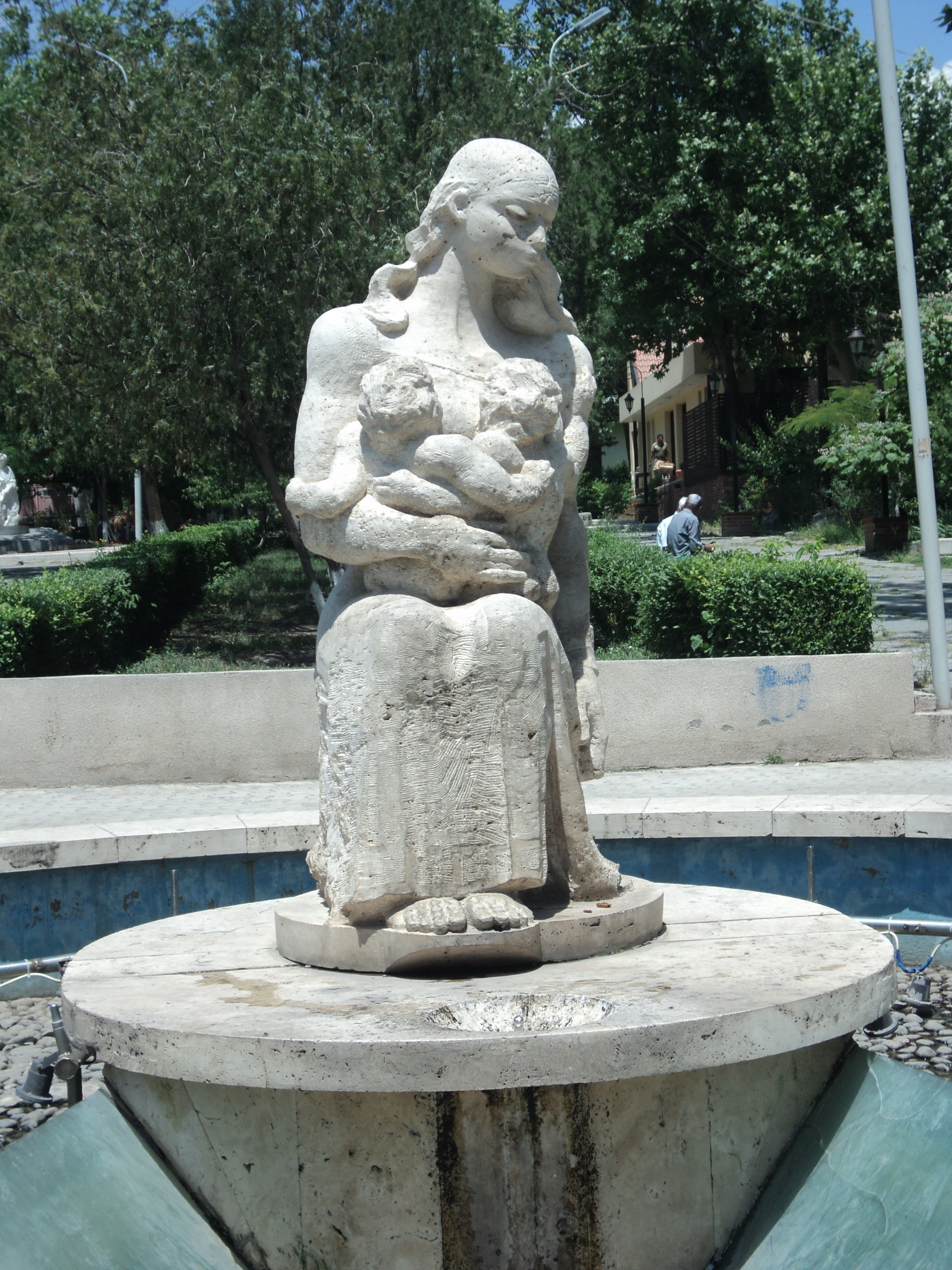 Ծովինար. Սանասարի եւ Բաղդասարի ծնունդը Քանդակագործ` Վիգեն Ավետիս Վահագն Դավթյանի անվան զբոսայգի, 2008 Գտնվում է Արաբկիր համայնքում, Կոմիտաս պողոտայի և Նաիրի Զարյան փողոցի միջև ընգած զբոսայգում, Արաբկիր թաղապետարանի մոտ 3/7